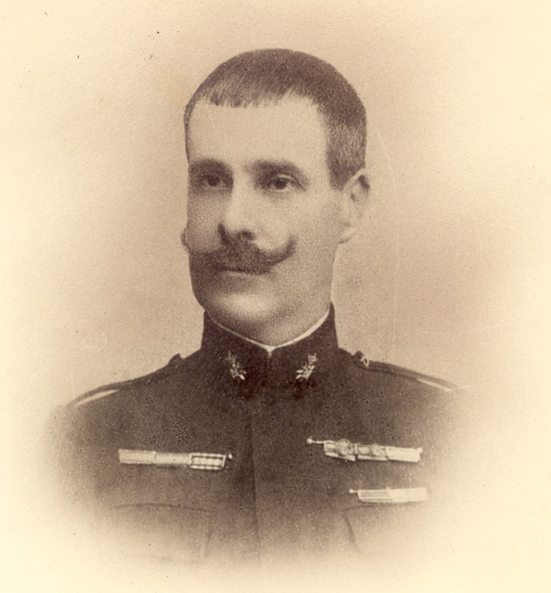 Henrique de Paiva Couceiro